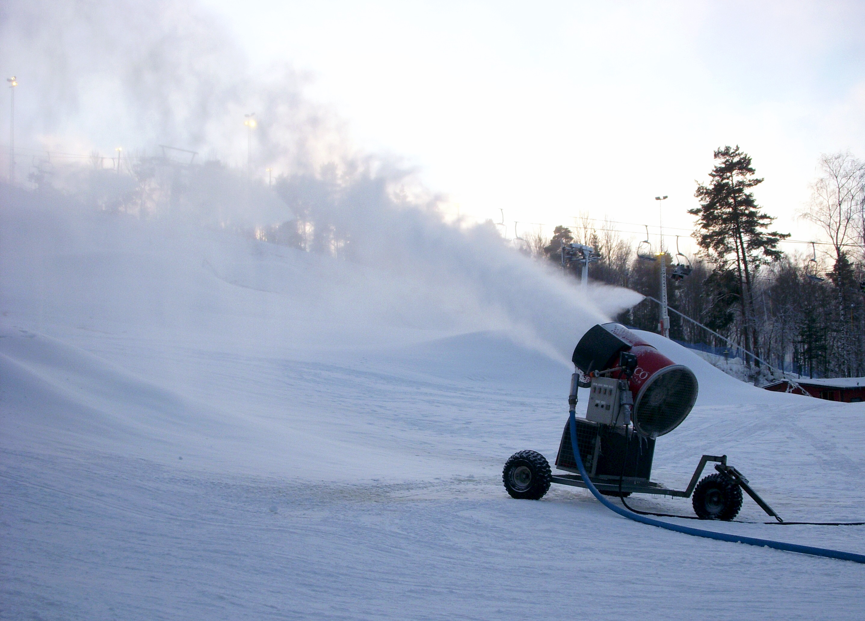 Snökanon på Flottsbrobacken i Stockholm